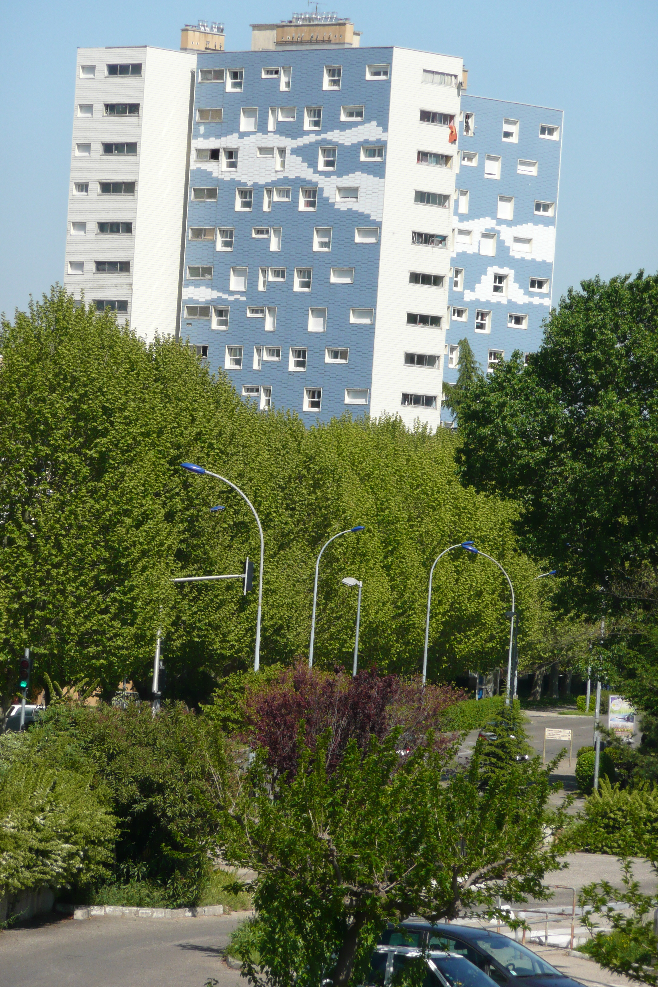 Immeuble à Bagnols-sur-Cèze.